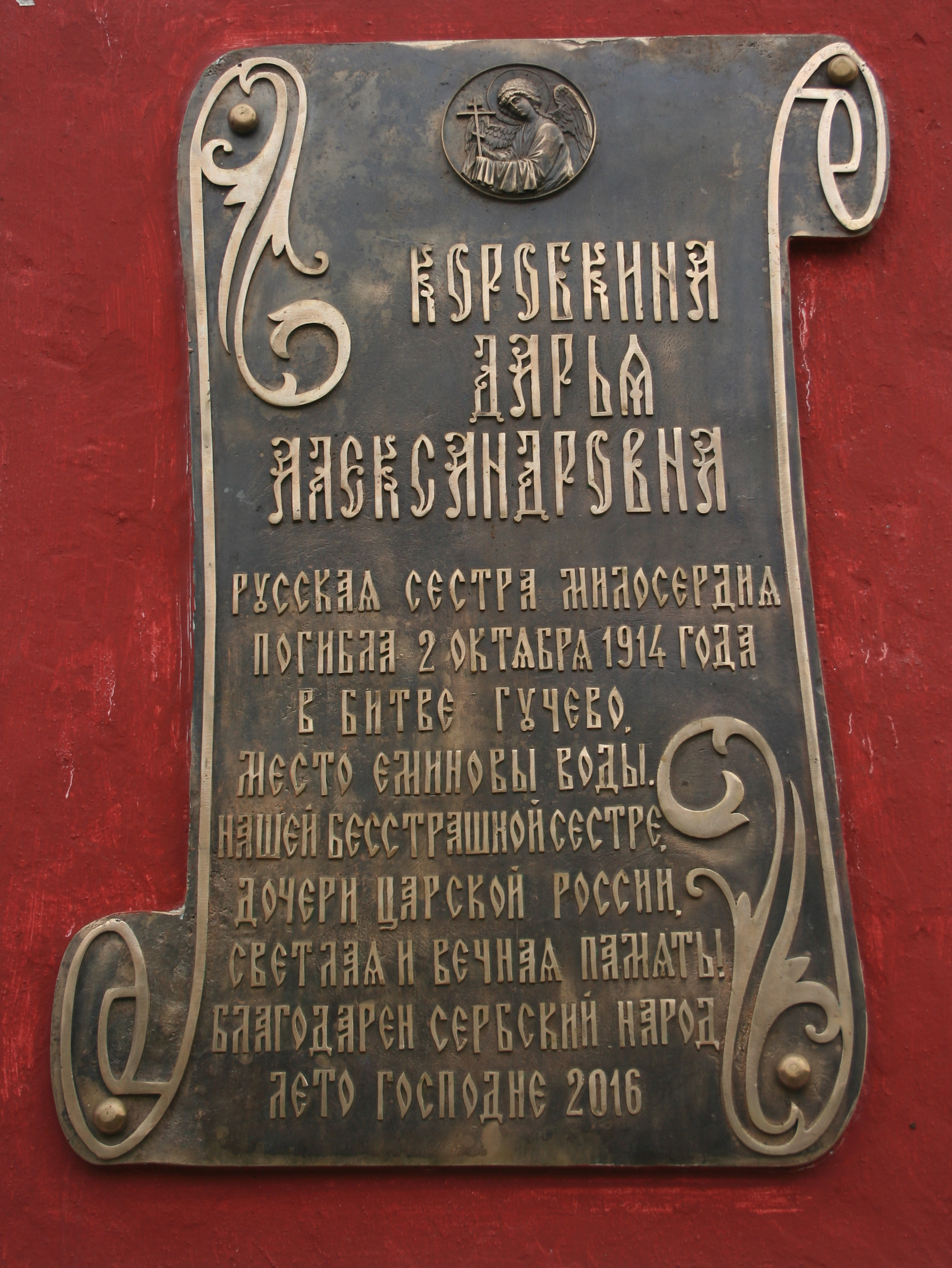 Stara škola u Bačevcima